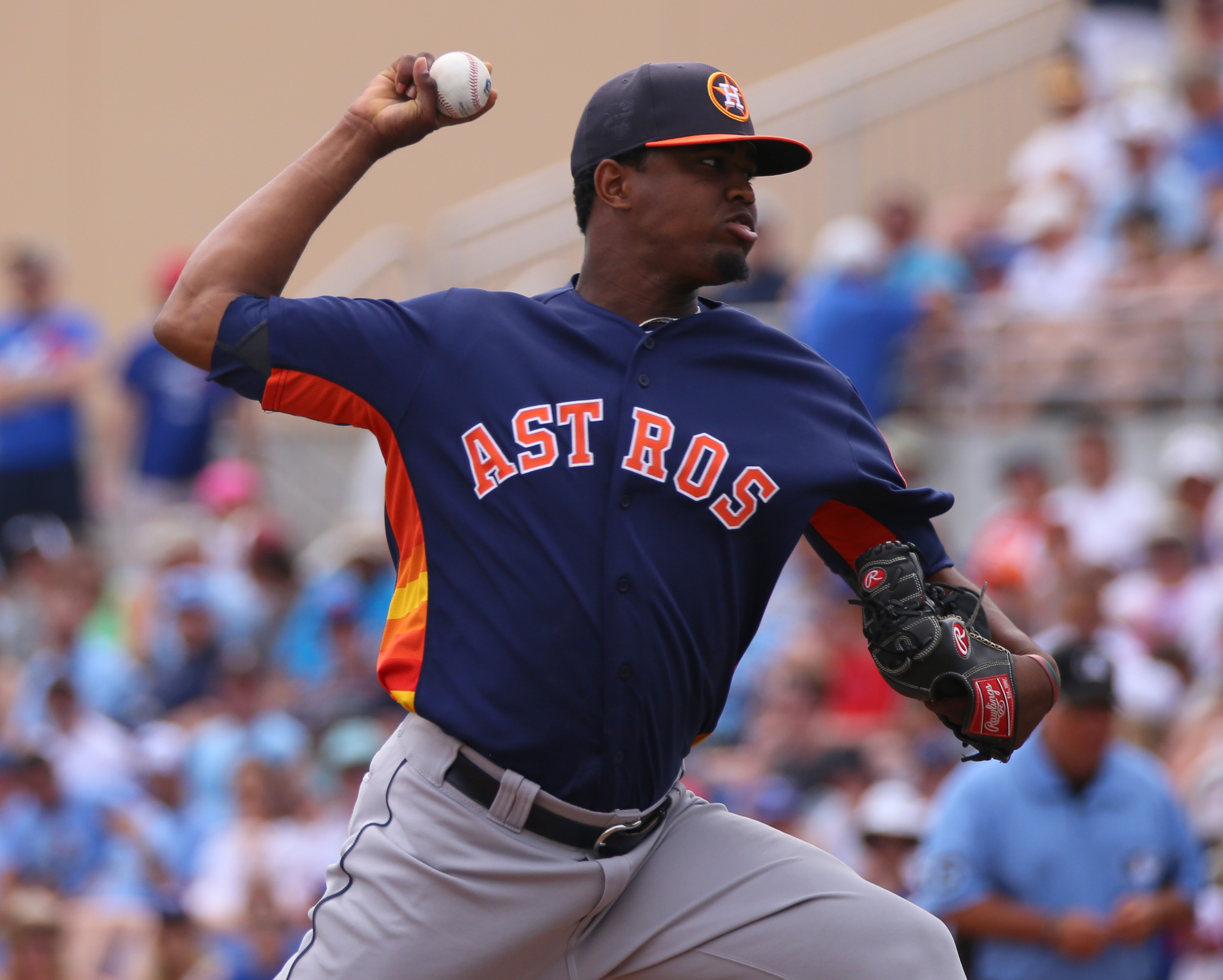 Jandel Gustave